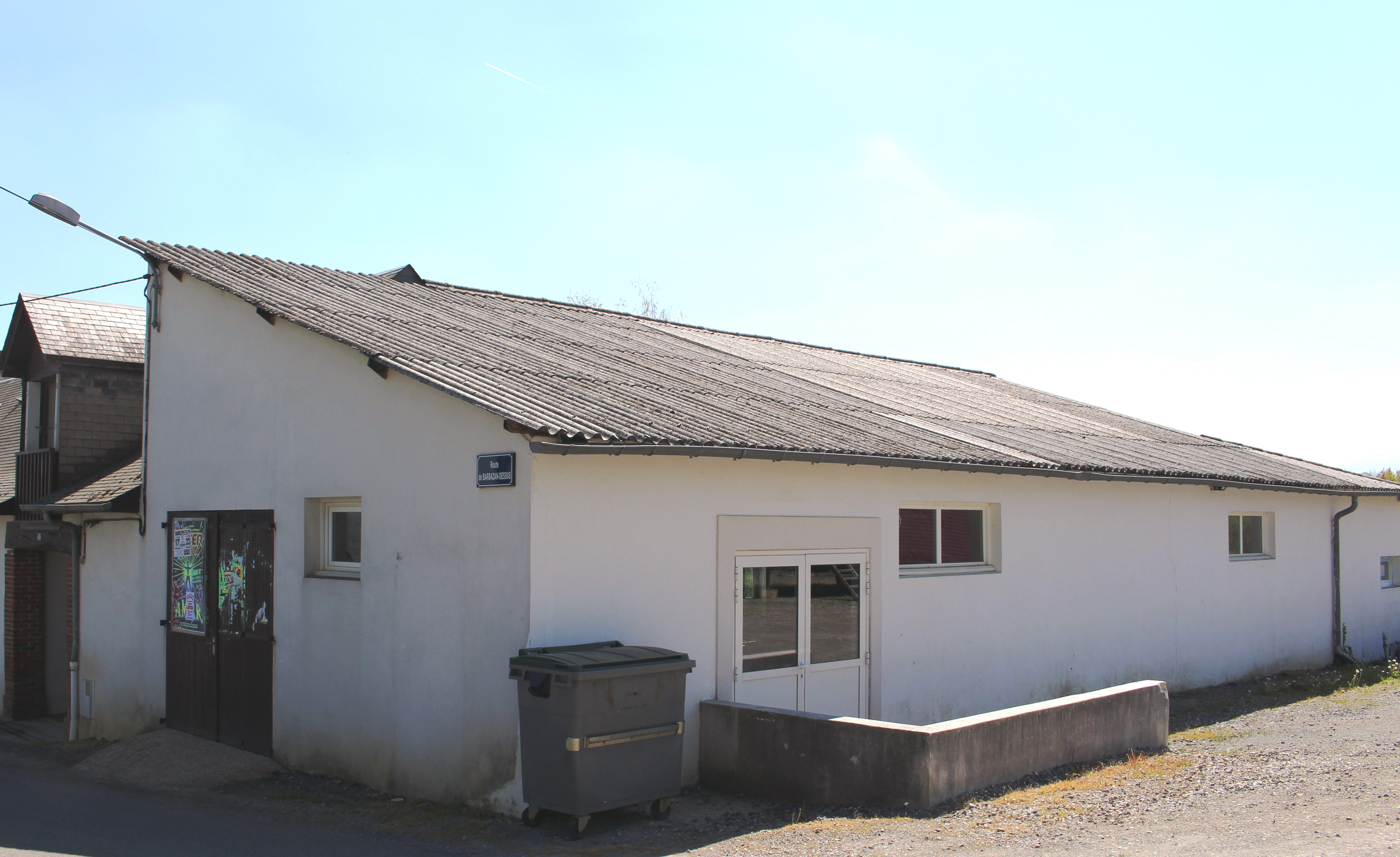 Salle des fêtes de Fréchou-Fréchet (Hautes-Pyrénées)